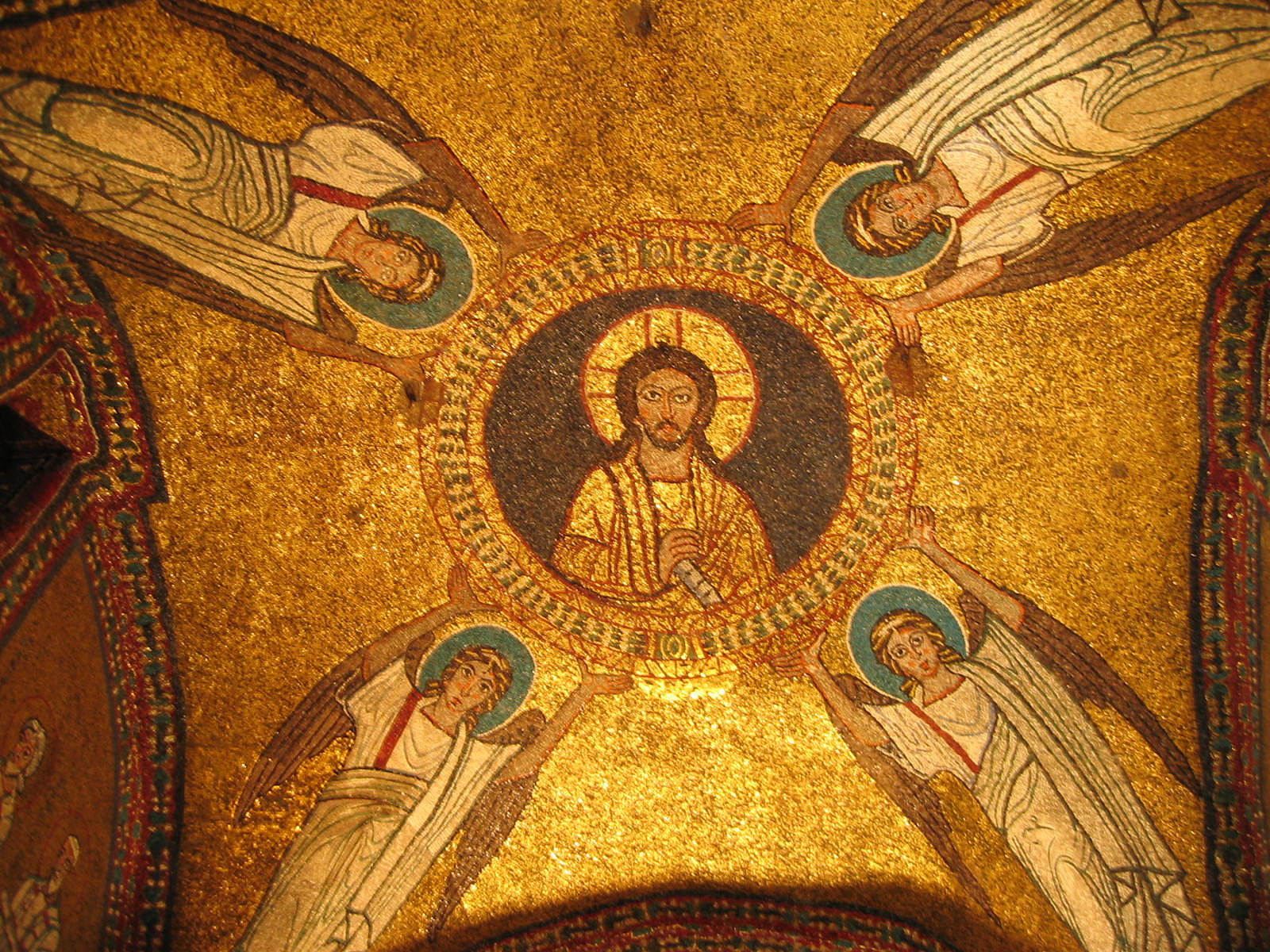 Cappella di San Zenone, Santa Prassede, Rome. Picture by Torvindus.